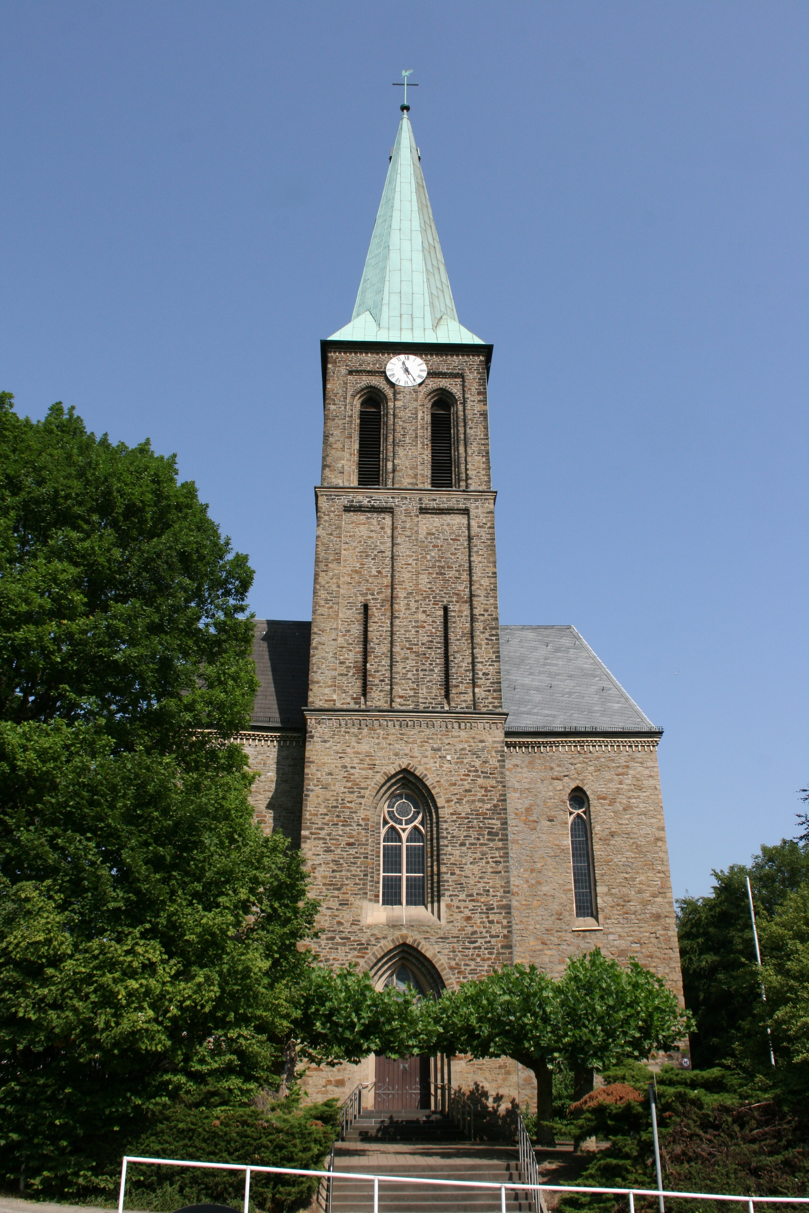 Kirche St. Mariä Geburt, Oslender Straße in Essen-Kupferdreh